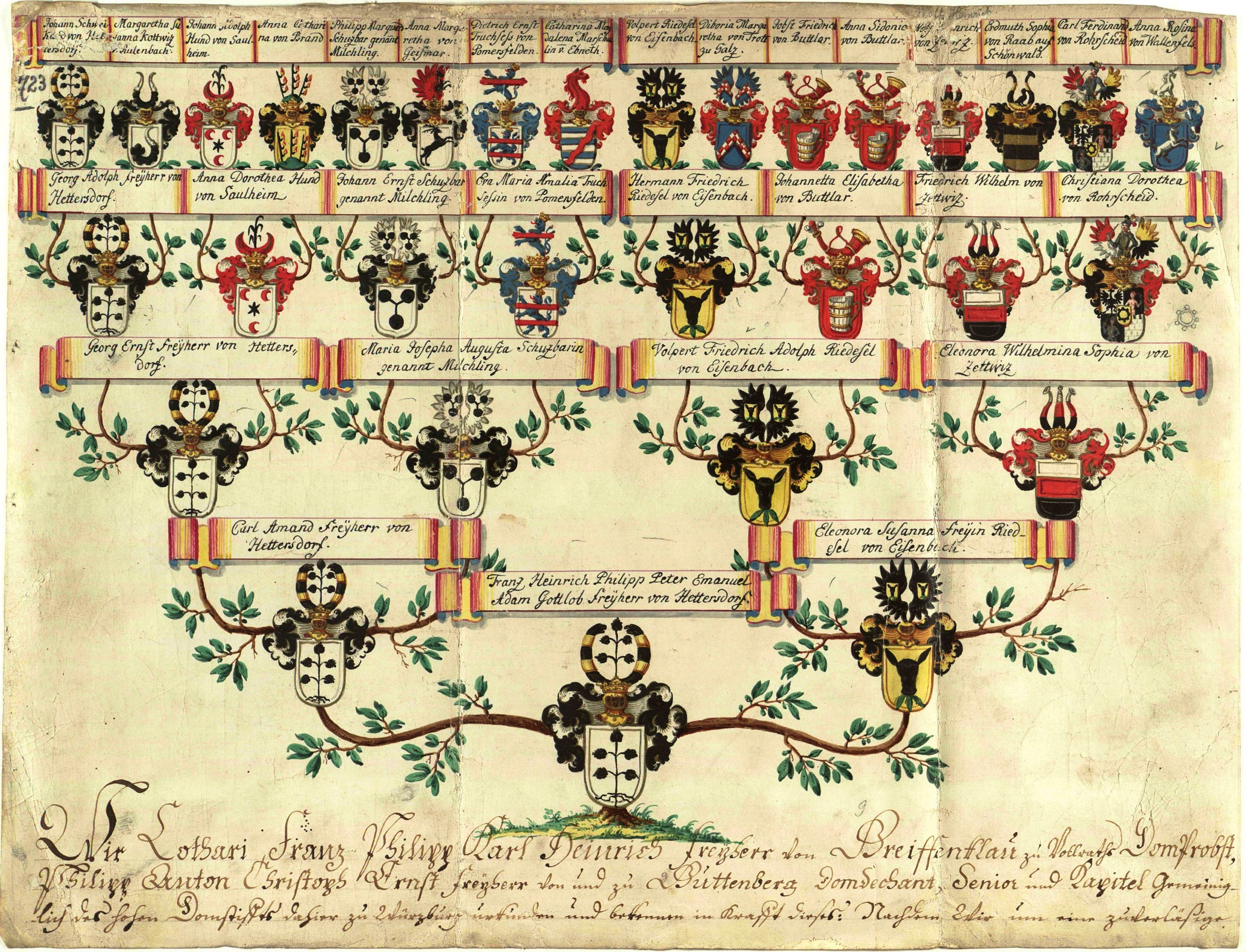 Ahnentafel für Franz Heinrich Philipp Peter Emanuel Adam Gottlob Freiherr von Hettersdorf, geboren den 23. Dezember 1758, ehelicher Sohn des Karl von Hettersdorf und der Eleonora Susanna geborene von Riedesel, deren Mutter eine von Zedtwitz war, der auf Grund dieses Dokuments im Hochstift Würzburg zur Präbende angenommen wurde. ([1])